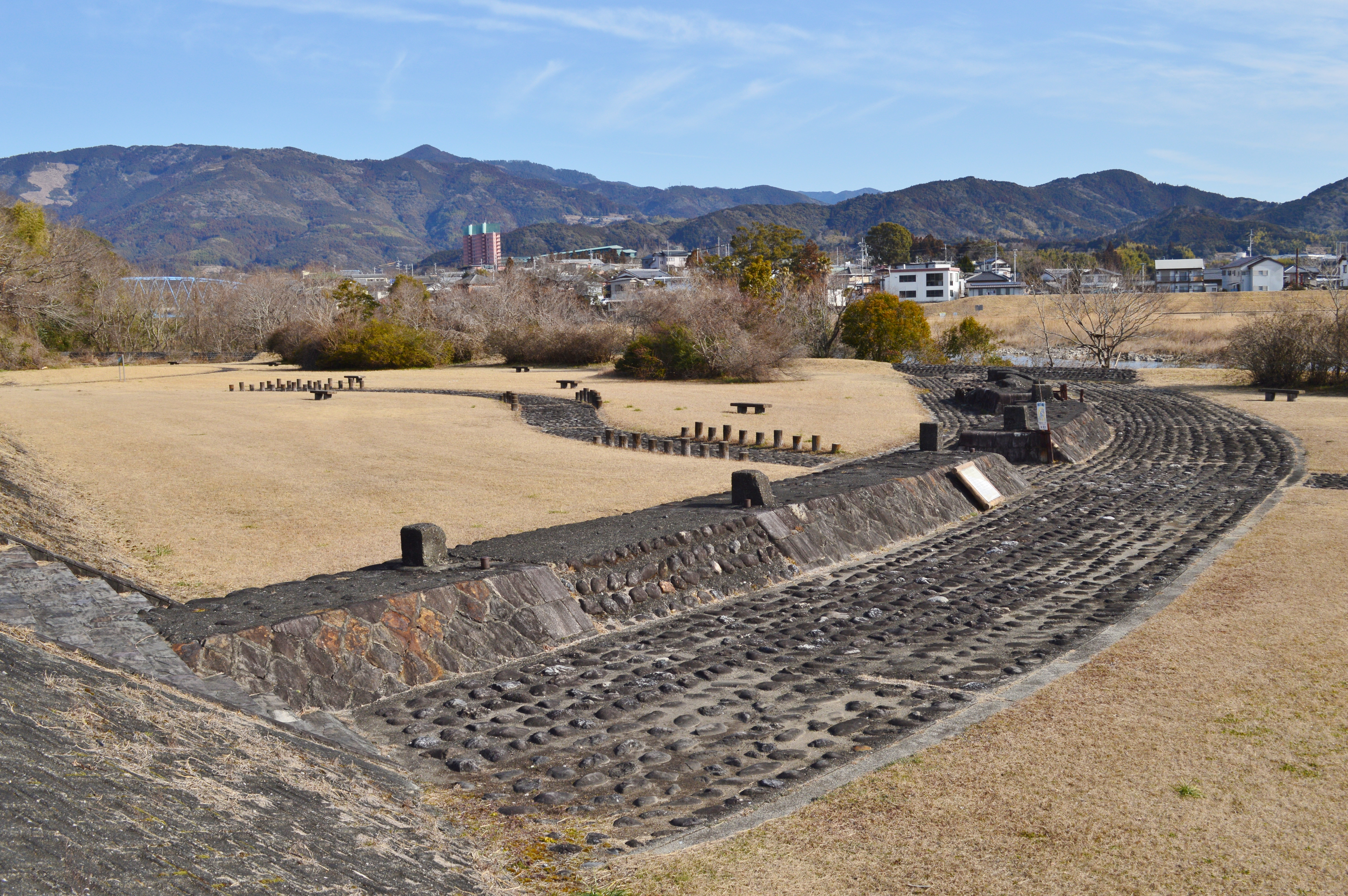 山田堰跡 (香美市) 全景 Nikon D3200